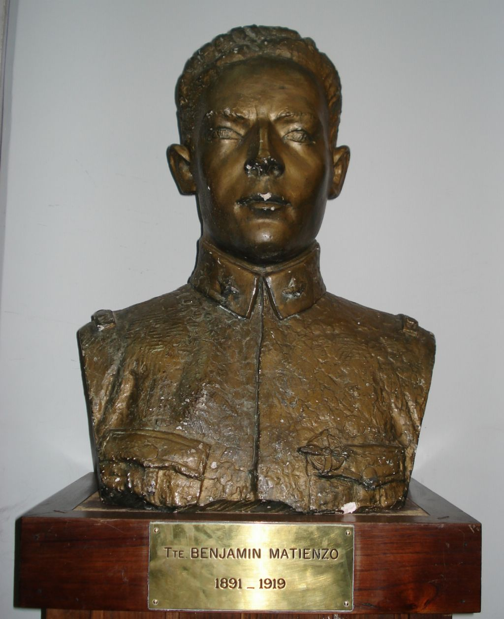 Busto de Benjamín Matienzo en el aeropuerto de San Miguel de Tucuman.